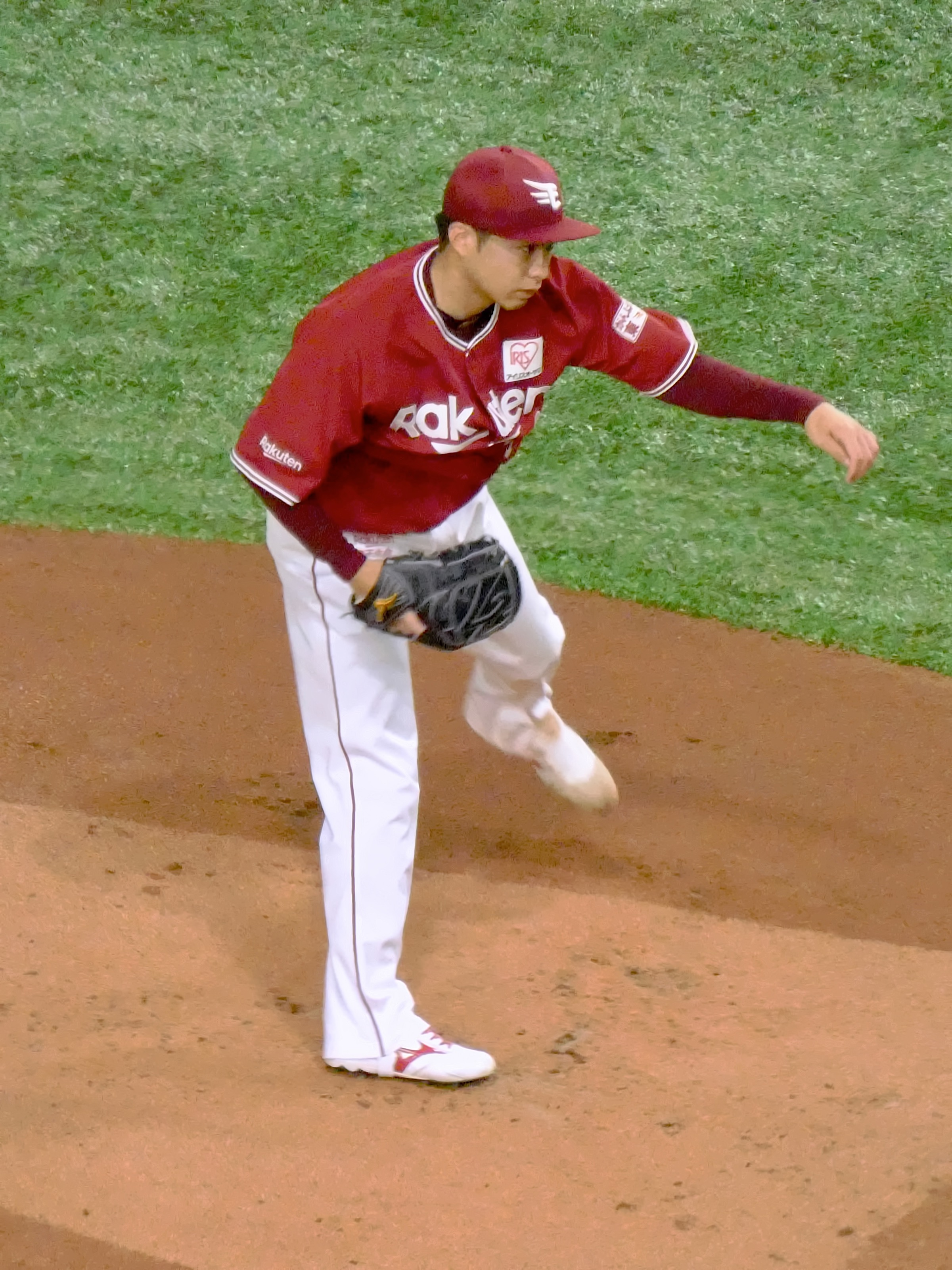 東北楽天ゴールデンイーグルスの選手「辛島航」。東京ドームにて。